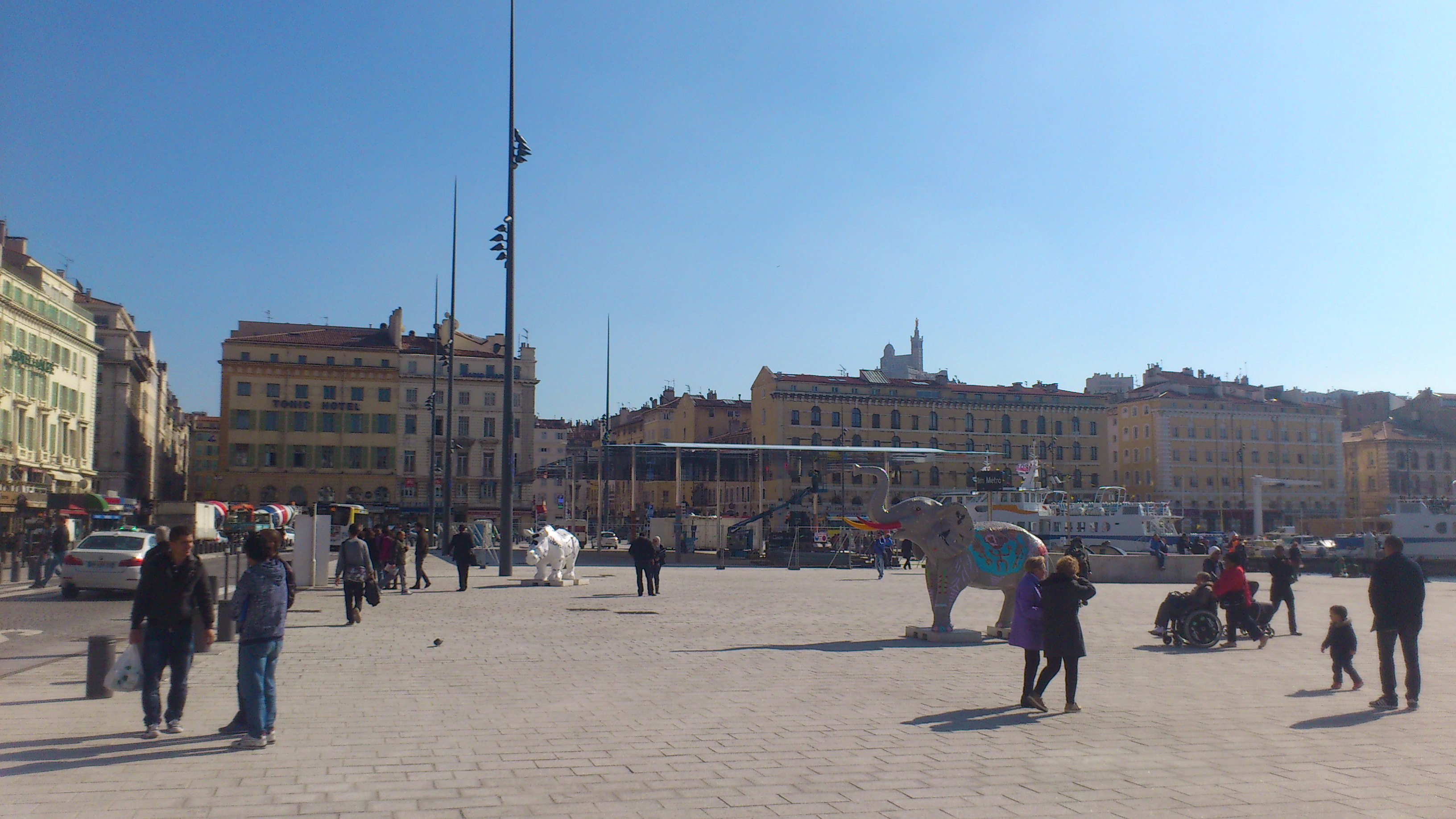 Quai de la Fraternité, mars 2013